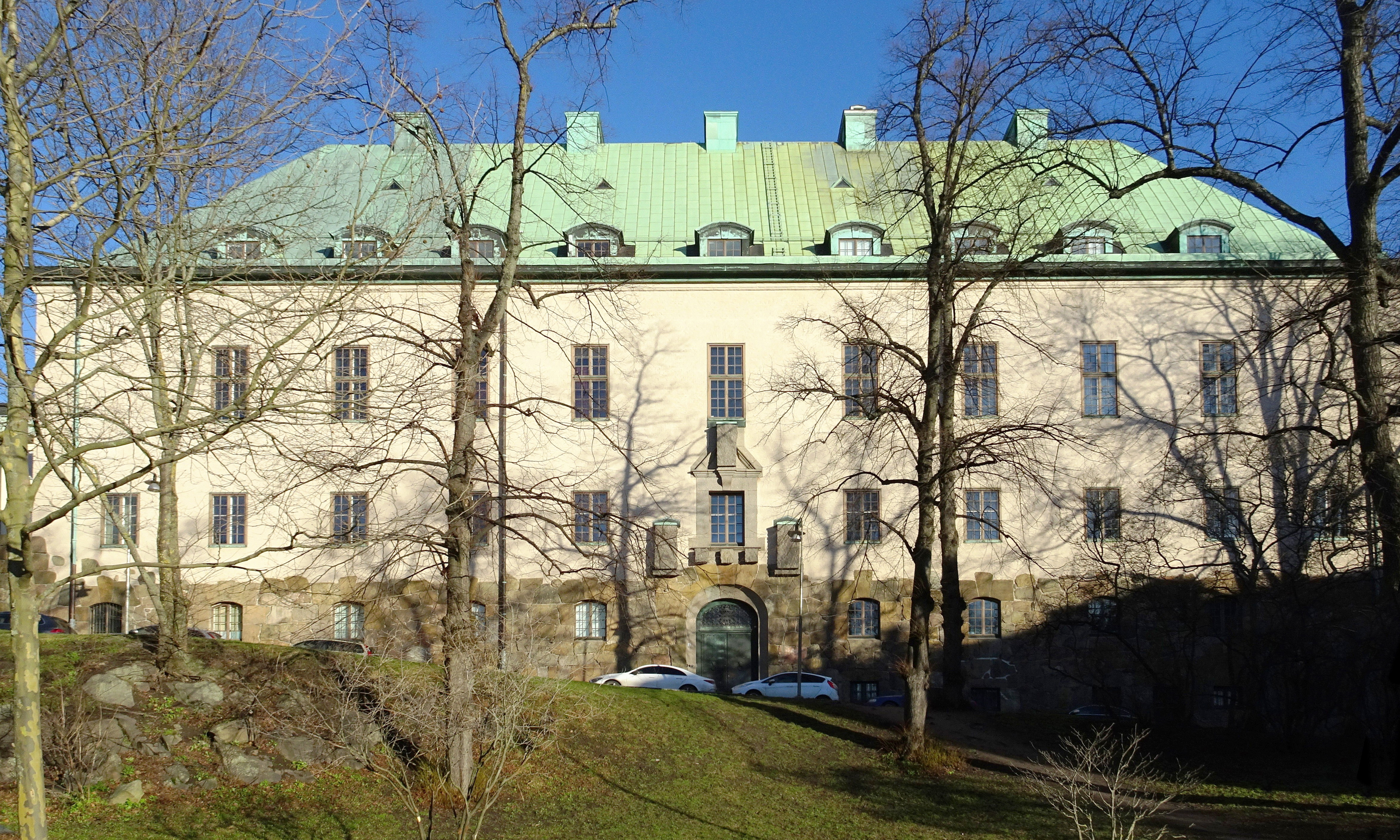 Timmermansordens hus, Stockholm, fasad mot väster